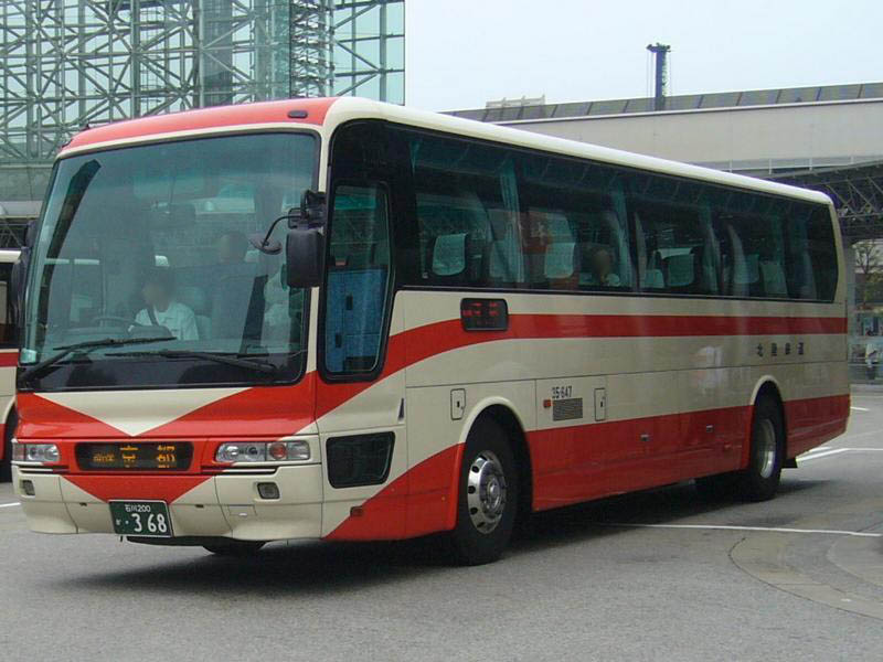 登録番号 石川200か・368 北陸鉄道所属 北陸特急バス用 三菱ふそう・エアロバス KL-MS86MP